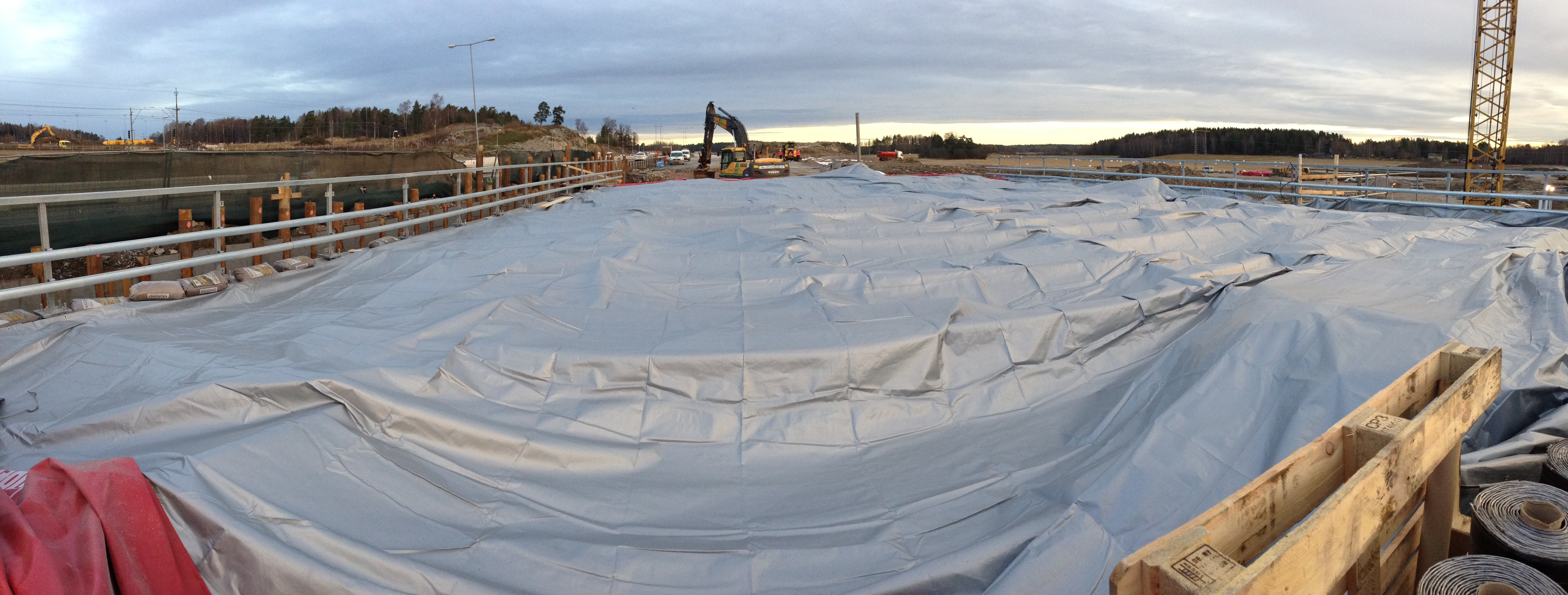 En enda stor presenning som används vid bygge av bro.